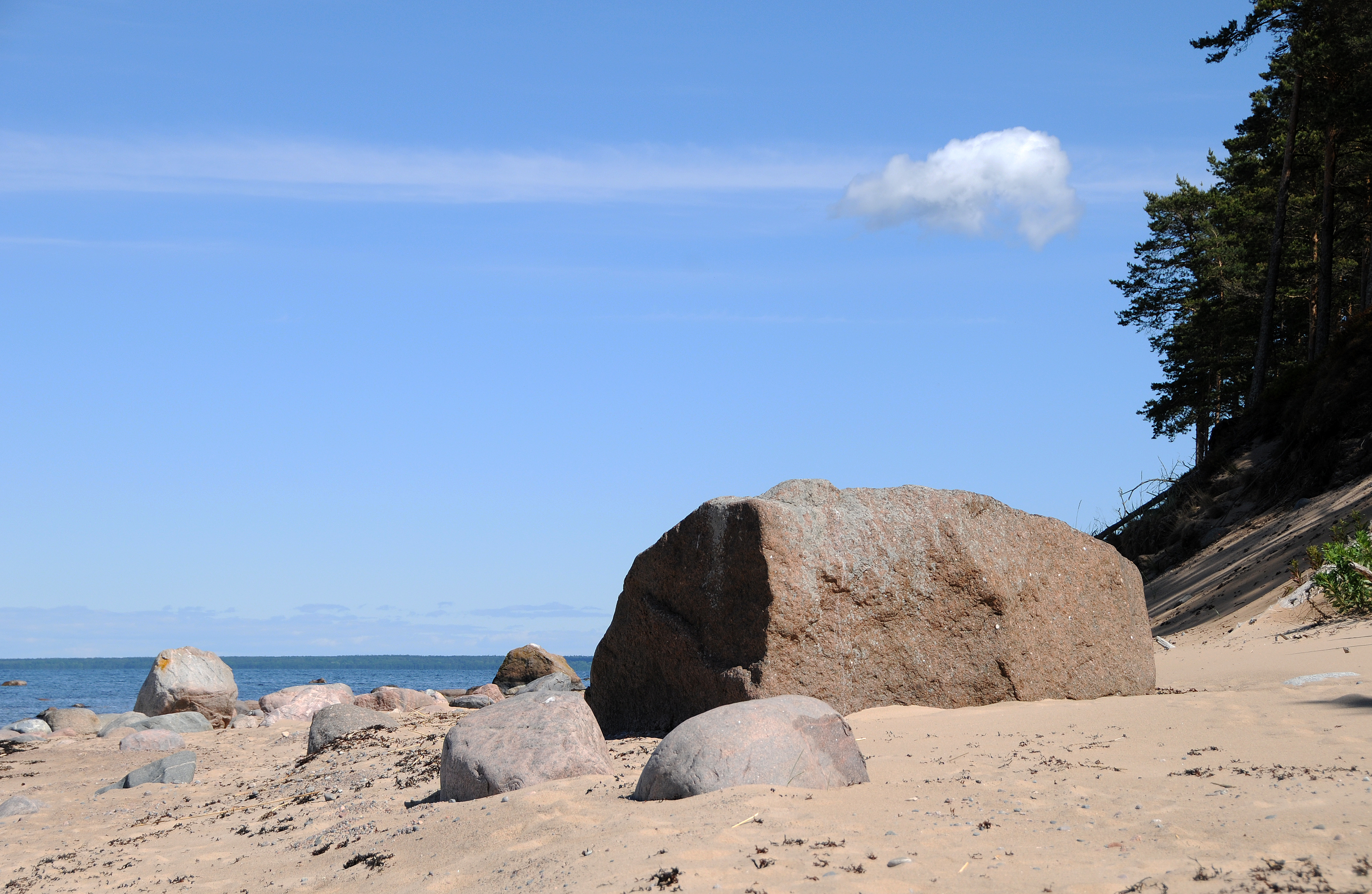 Pedassaar - Landvaotsa liivakivastangu all